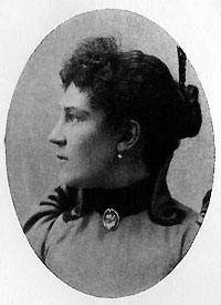 Sie Christiernsson